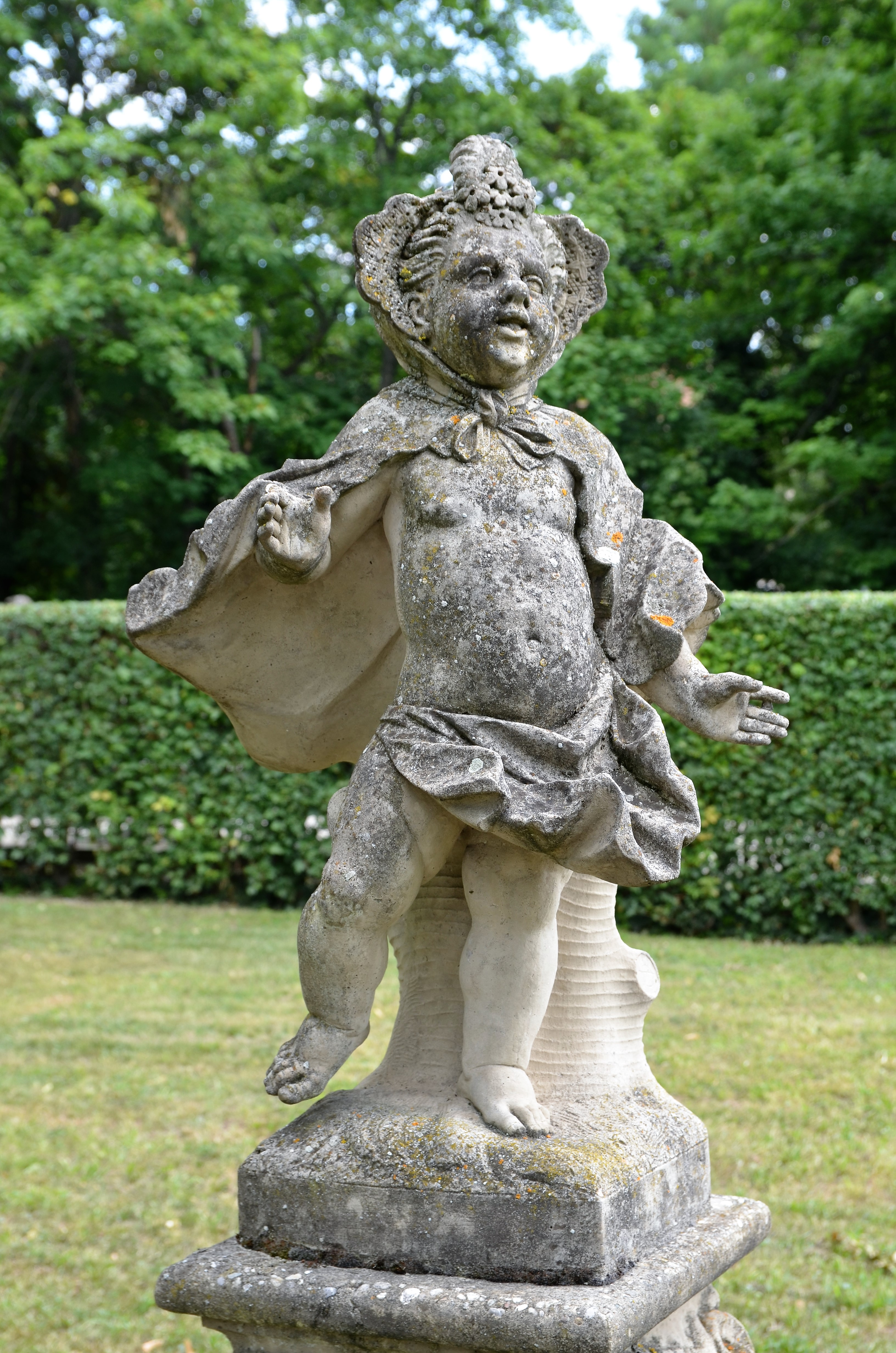 Hesperidengärten